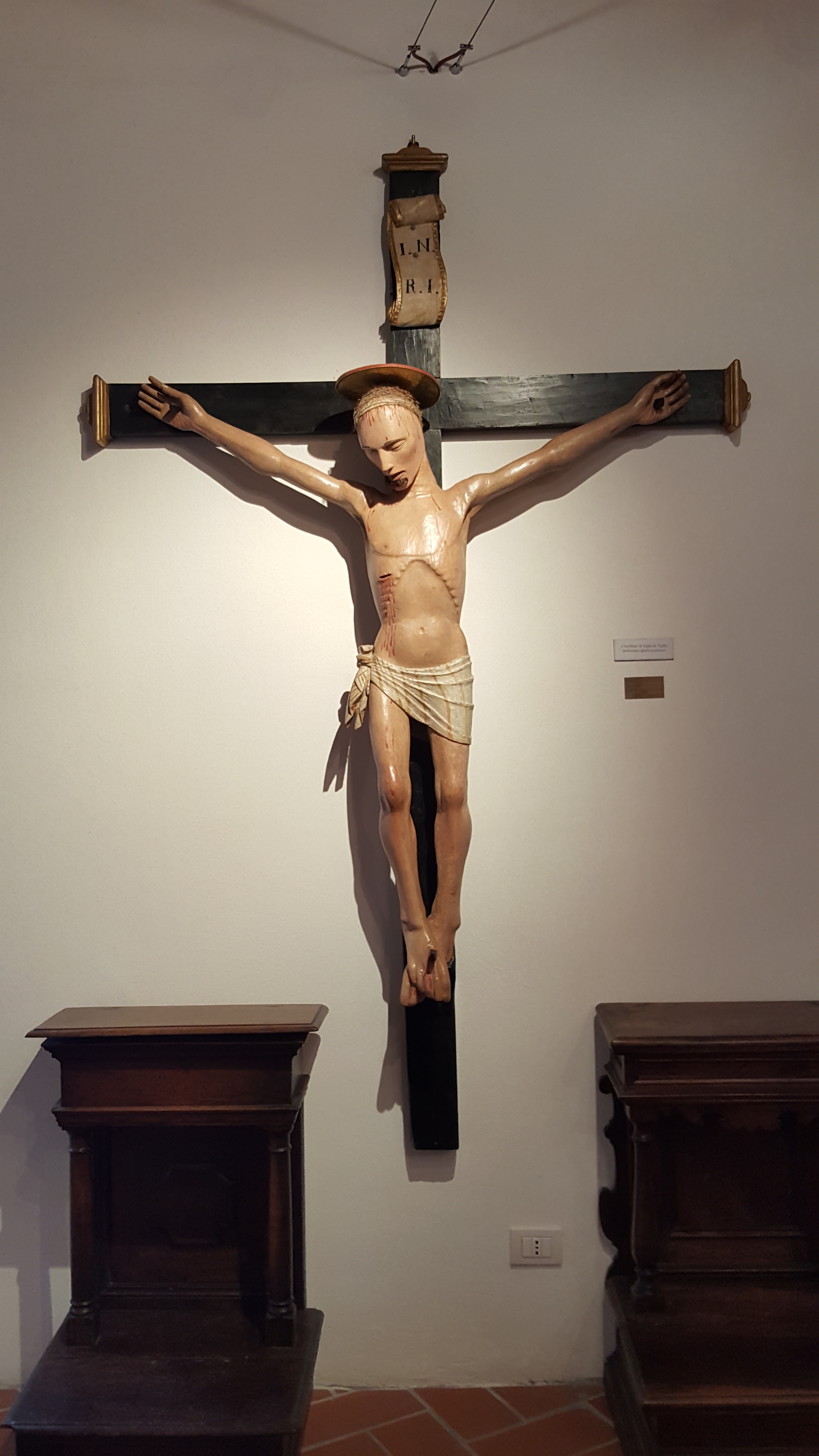 Museo di Saludecio e del Beato Amato This is a photo of a monument which is part of cultural heritage of Italy.